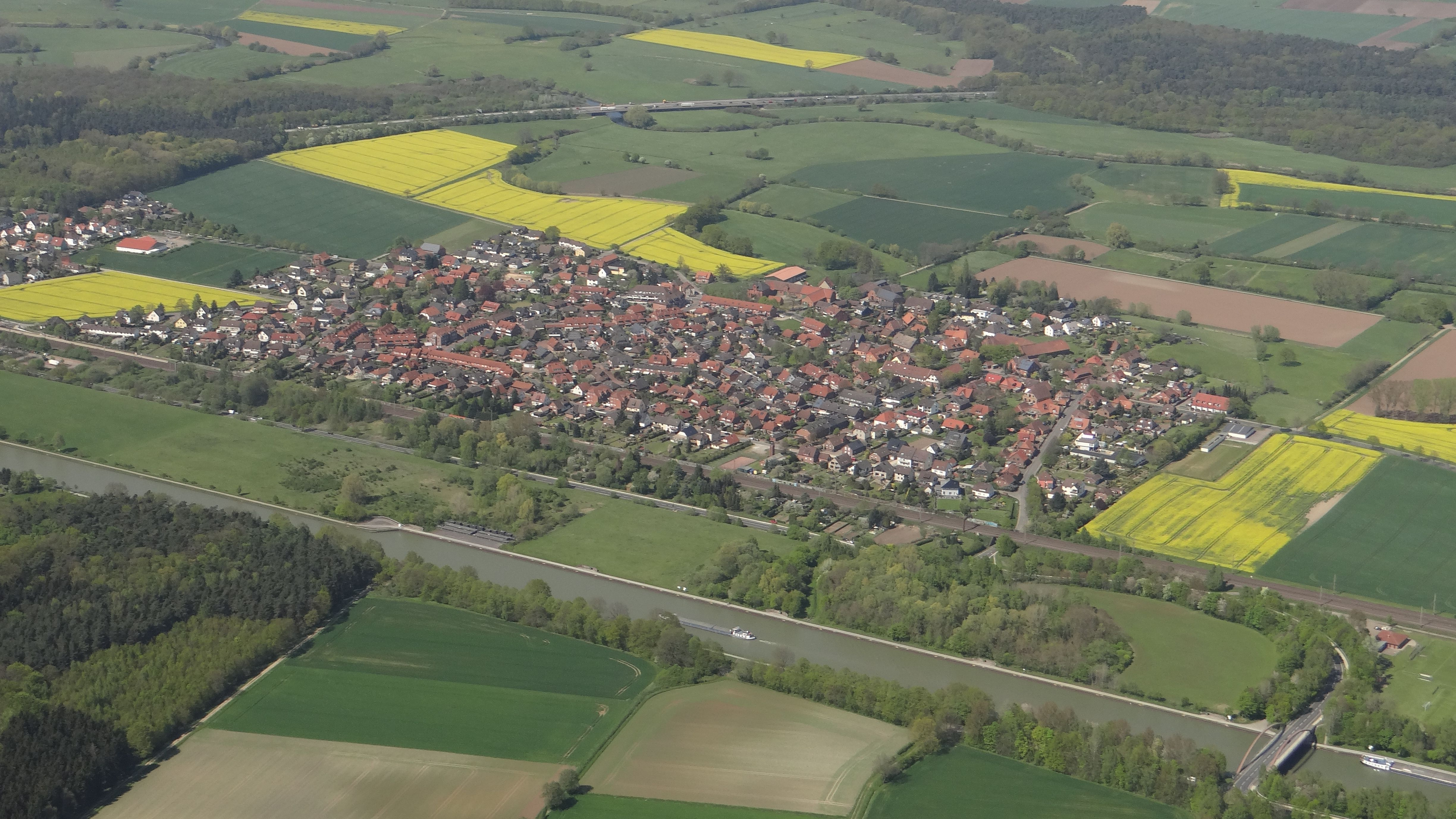 Gümmer Luftbild im Mai 2016